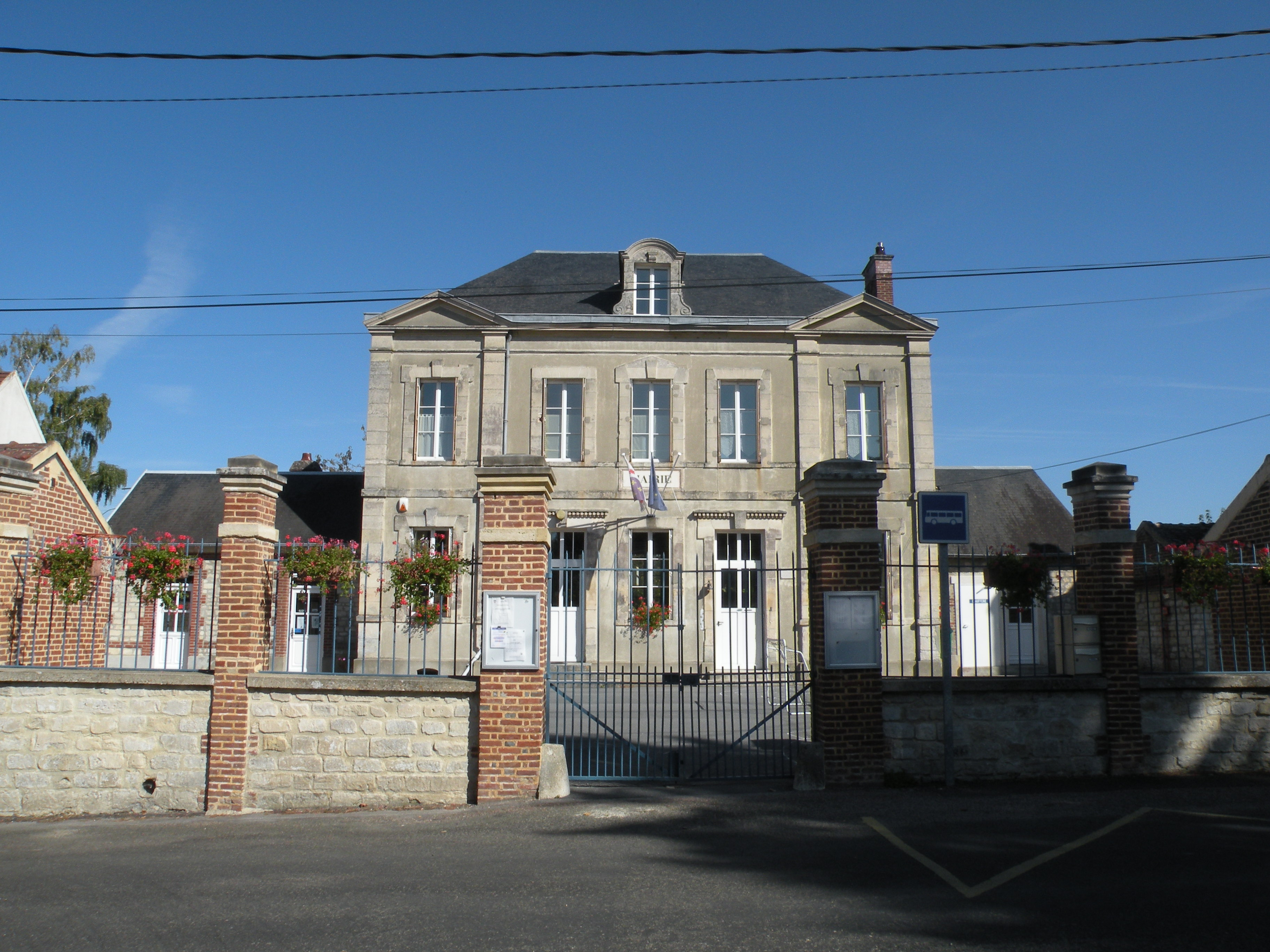 Mairie de Hadancourt-le-Haut-Clocher.